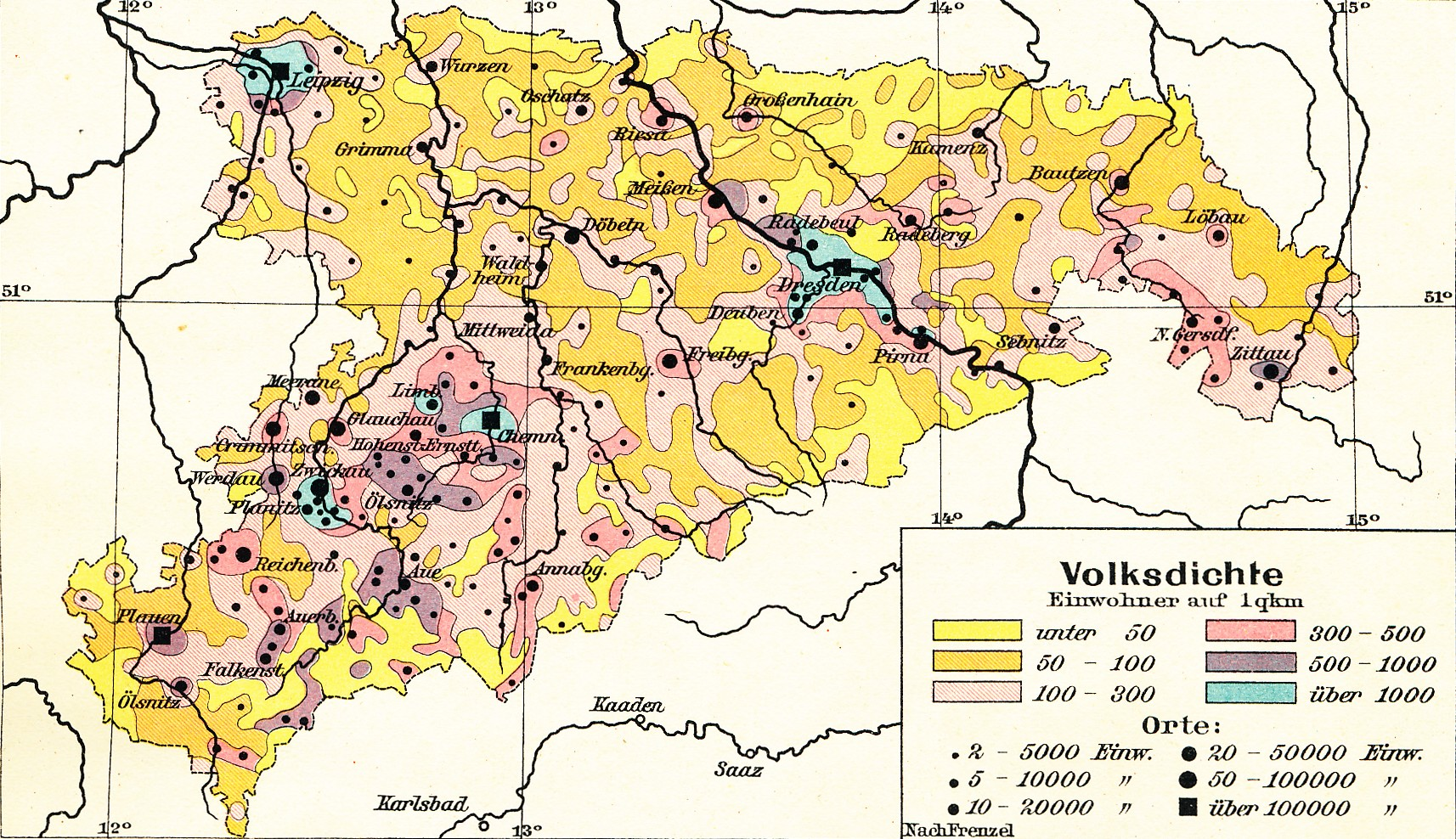 Freistaat Sachsen, Volksdichte (Einwohner auf 1qkm) This is a part of an old atlas. It does not represent the current situation.